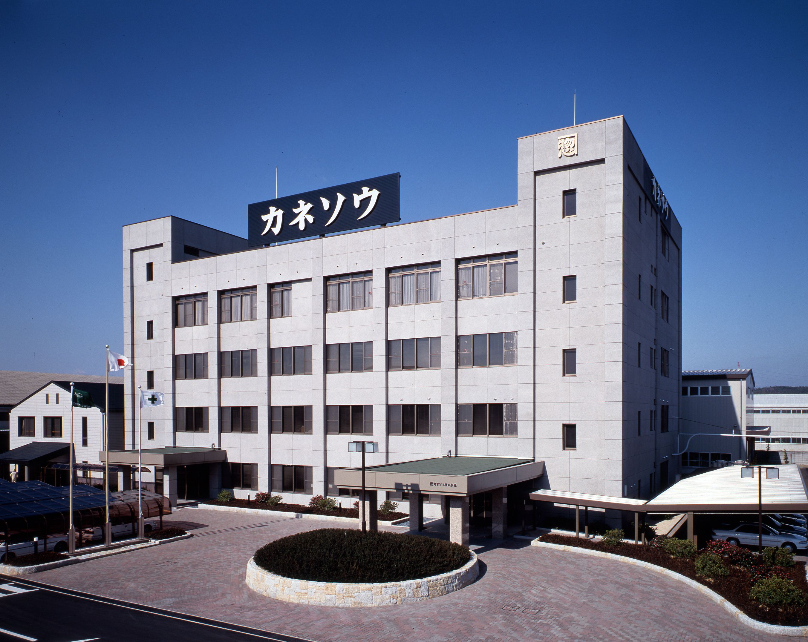 カネソウ株式会社 本社